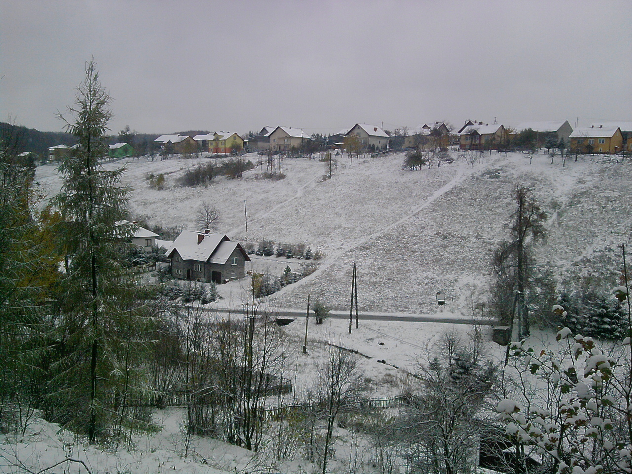 Sąspów